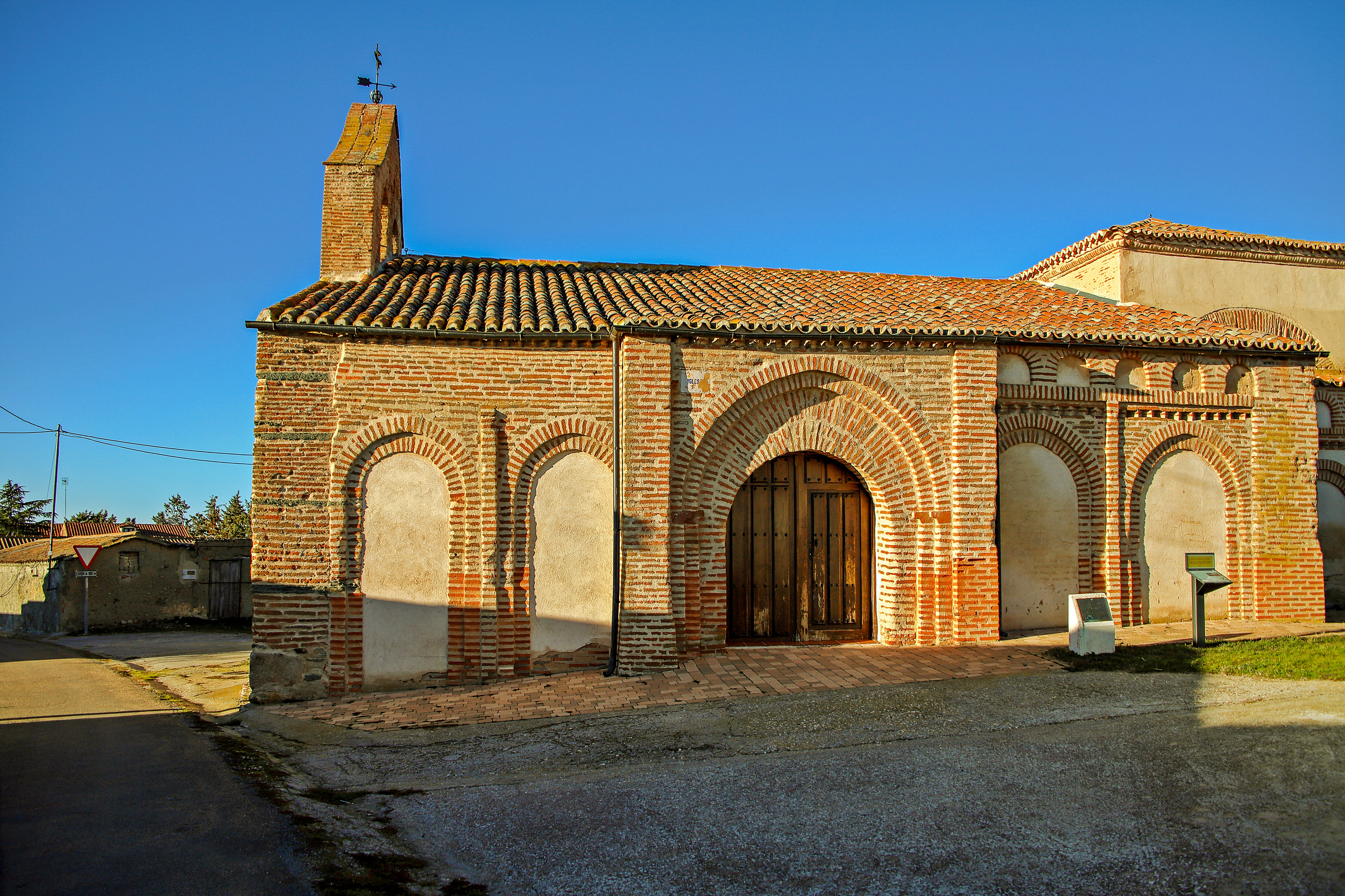 Galleguillos es una localidad que pertenece al municipio de Gajates, comarca de Tierras de Alba, provincia de Salamanca.